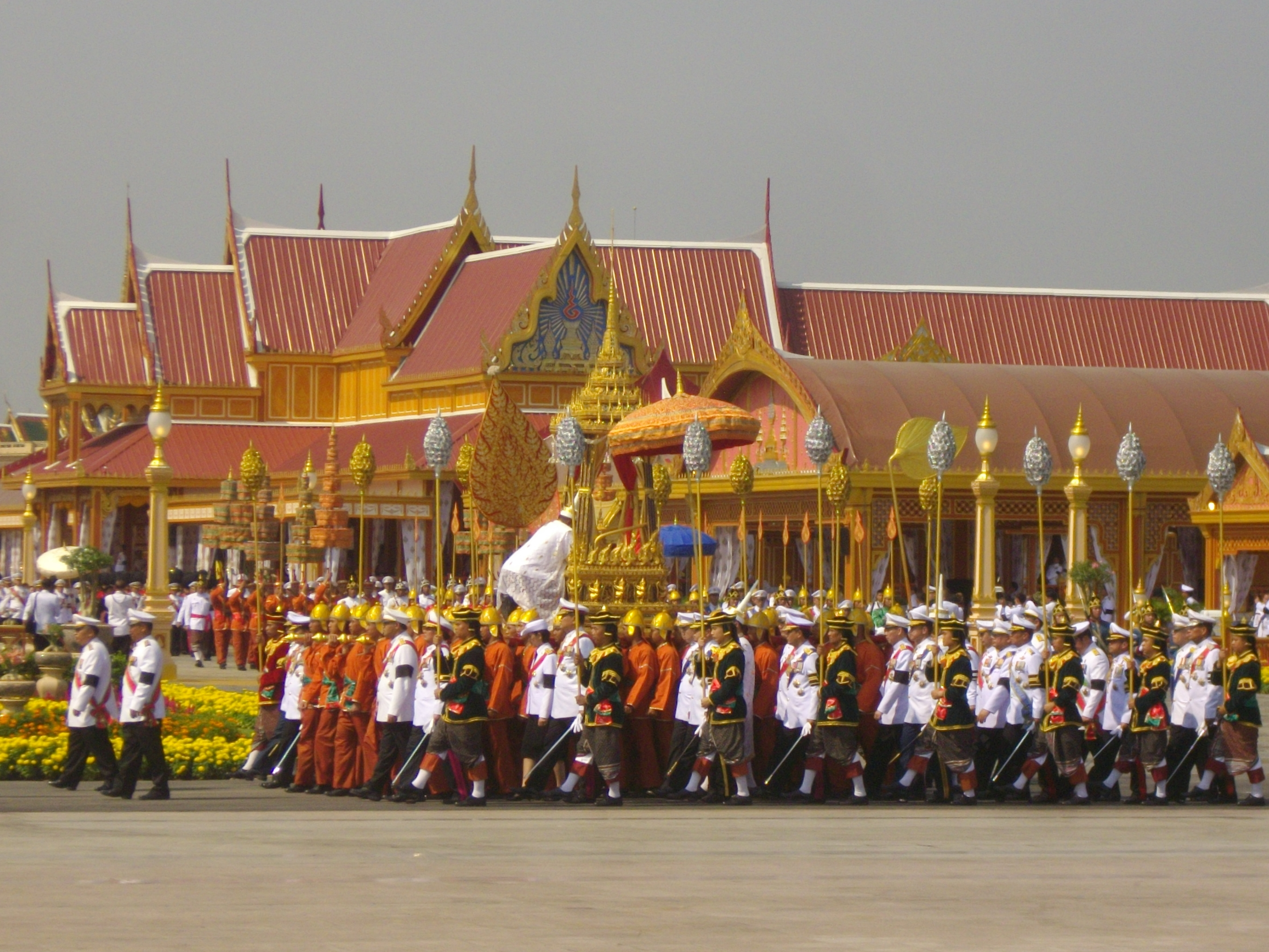 ริ้วกระบวนพระอิสริยยศ อัญเชิญพระโกศพระอัฐิของสมเด็จพระเจ้าภคินีเธอ เจ้าฟ้าเพชรรัตนราชสุดา สิริโสภาพรรณวดี ทรงพระที่นั่งราเชนทรยาน ออกจากพระเมรุ ณ ท้องสนามหลวง สู่พระที่นั่งดุสิตมหาปราสาท พระบรมมหาราชวัง ในเช้าวันที่ 10 เมษายน พ.ศ. 2555 ภาพนี้ถ่ายขณะริ้วขบวนกำลังเคลื่อนออกจากราชวัติของพระเมรุ ณ ท้องสนามหลวง